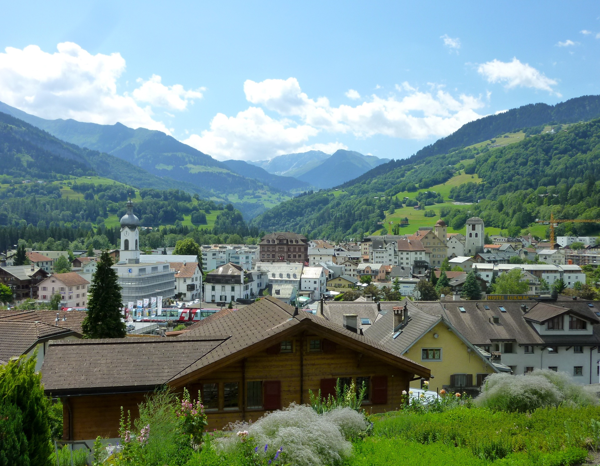 Ilanz, Blick nach Süden